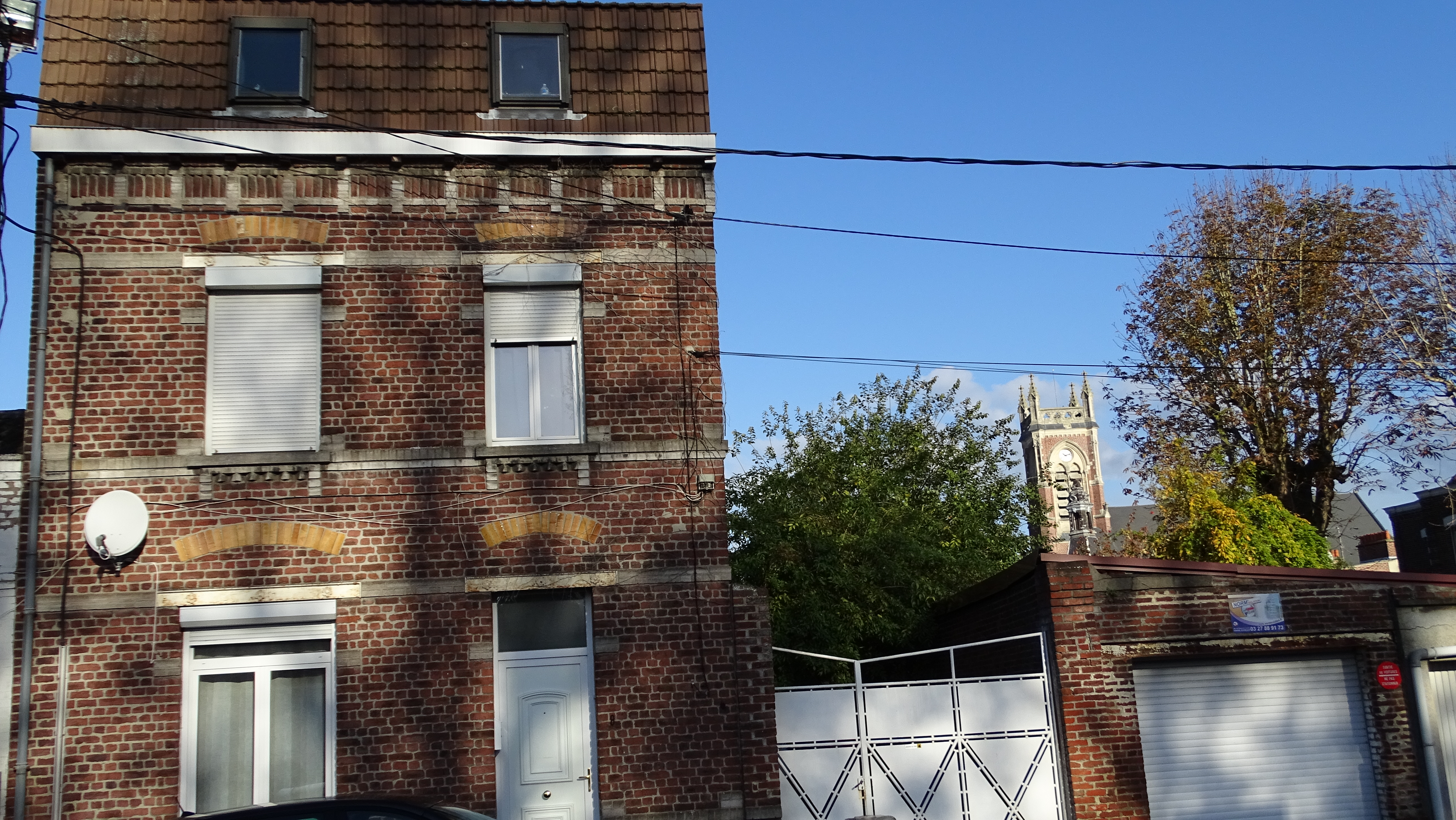 Raymond Bastin , son lieu de naissance à Aniche au 10 rue des écoles actuelle rue Jules Domisse